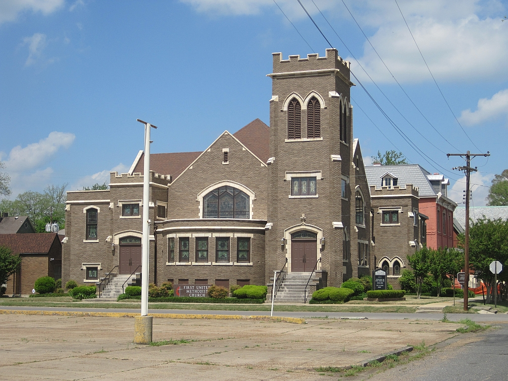 Helena, Mississippi